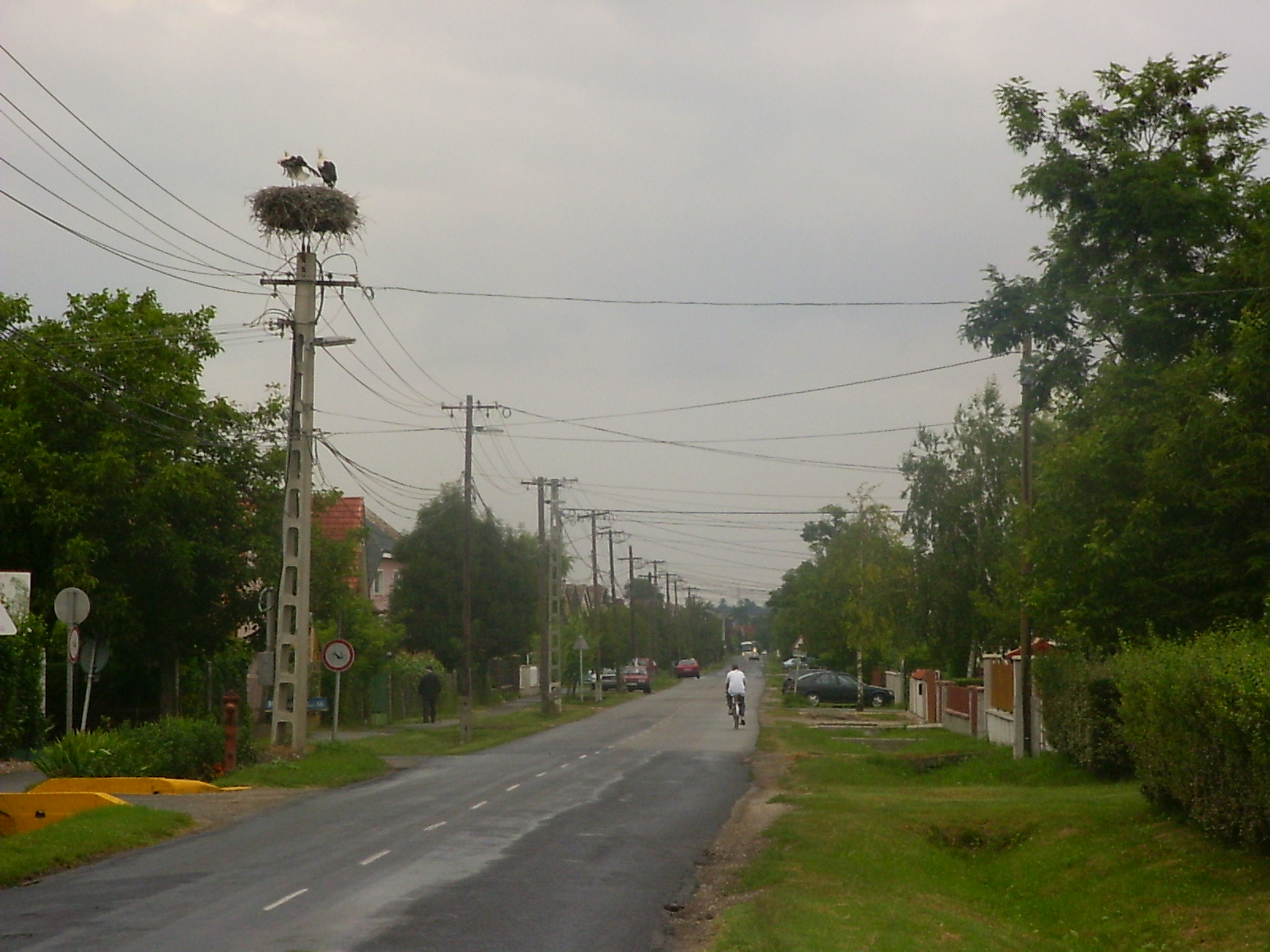 Töltéstava egyik utcája